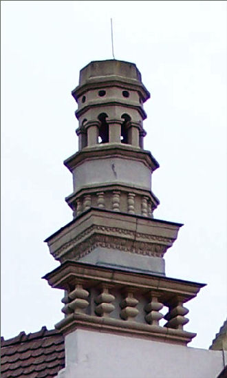 Schornstein des Hofrichterhauses in Bautzen, Spätrenaissance